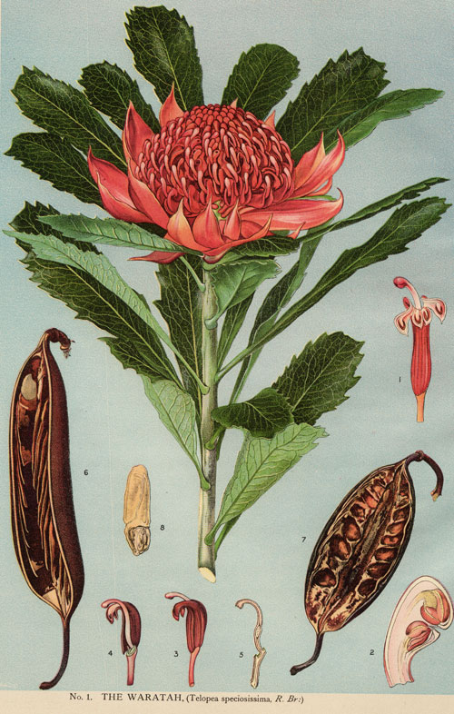 Telopea speciosissima